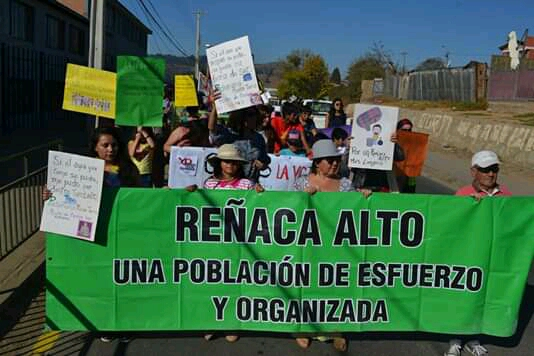 Marcha de Reñaca Alto